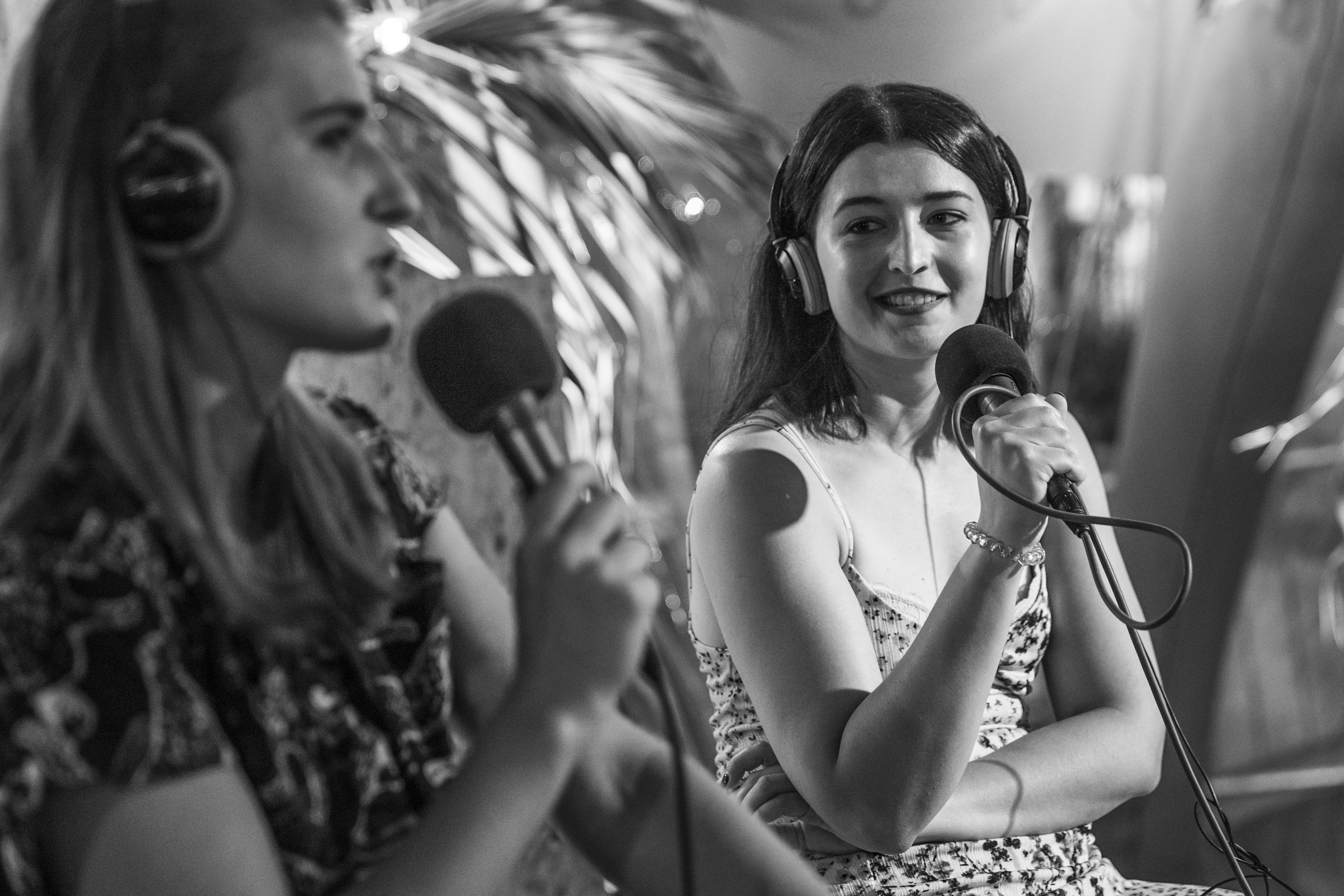 Aneta Hudzik i Ania Prokop podczas prowadzą audycję Kocyk fot. Weronika Suchodolska